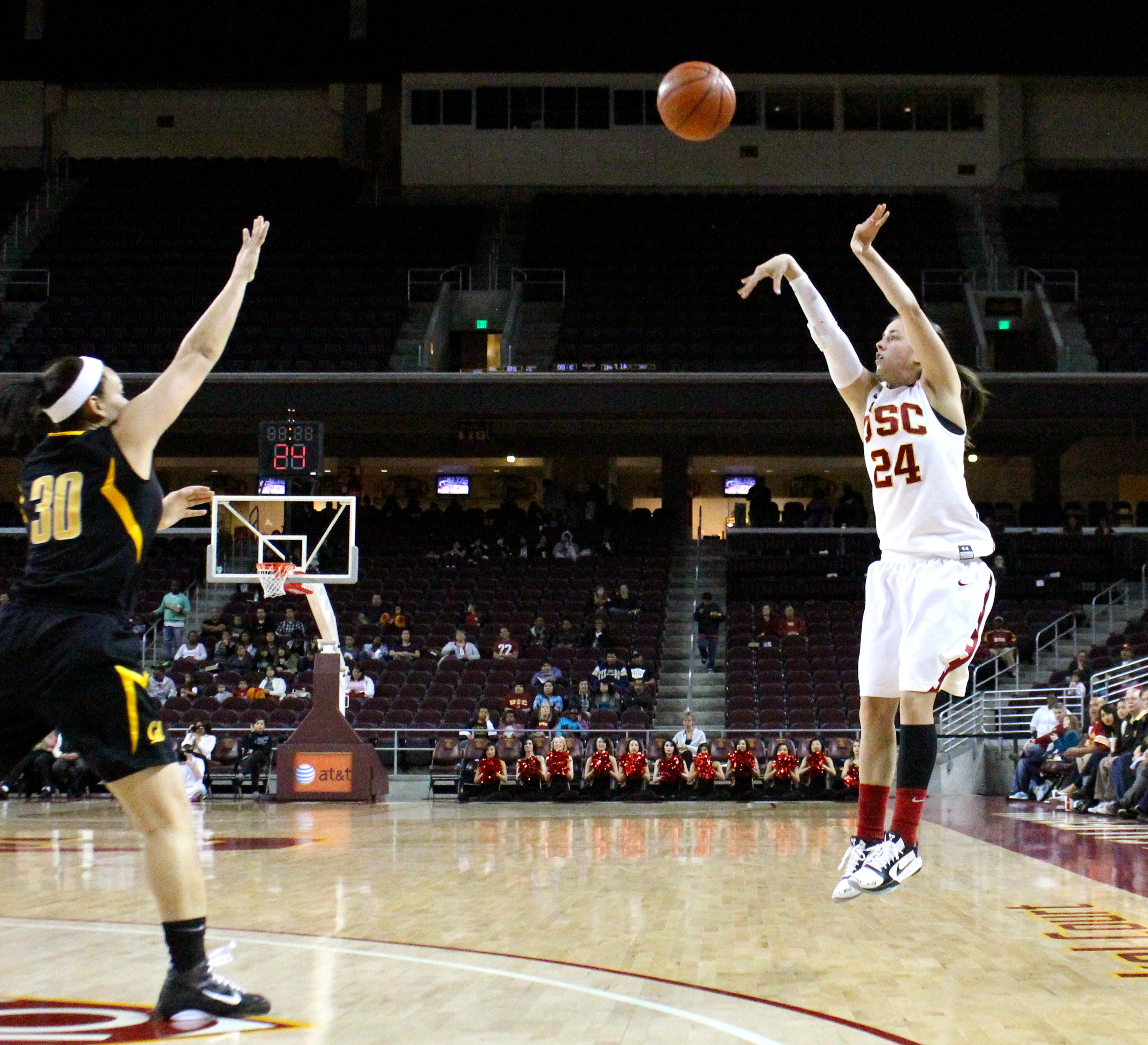 La joueuse des USC Trojans Ashley Corral tire à trois points lors du Tournoi de la Pac 10